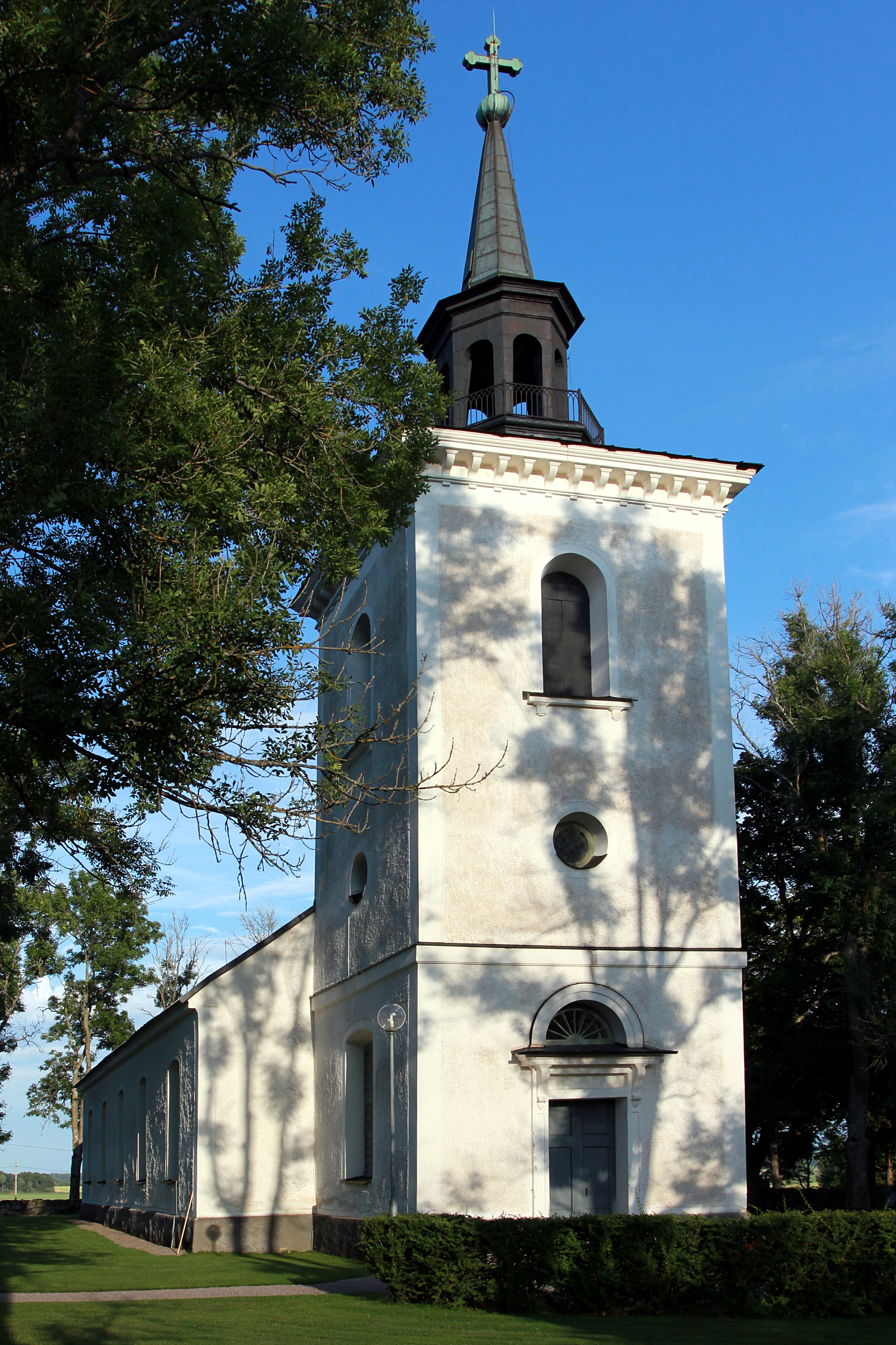 Stenkvista kyrka, ca 3 km söder om Eskilstuna, Södermanlands län, Sverige